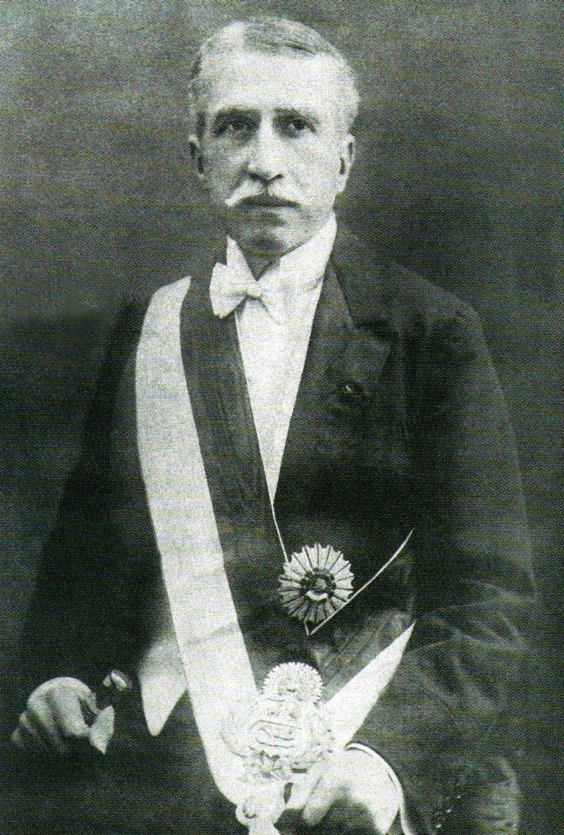 augusto b leguia